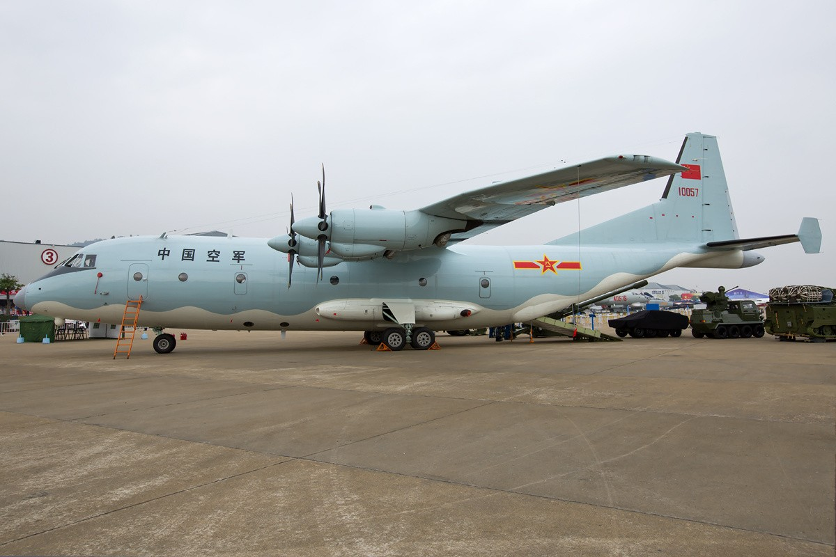 10057 at Zhuhai - Sanzao (ZUH / ZGSD)